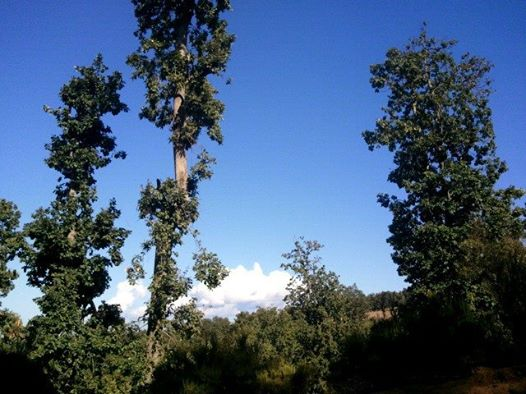 achjar zane